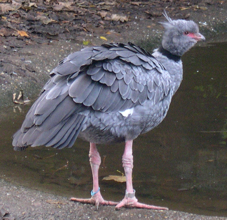 Een Kuifhoenderkoet (Chauna torquata).